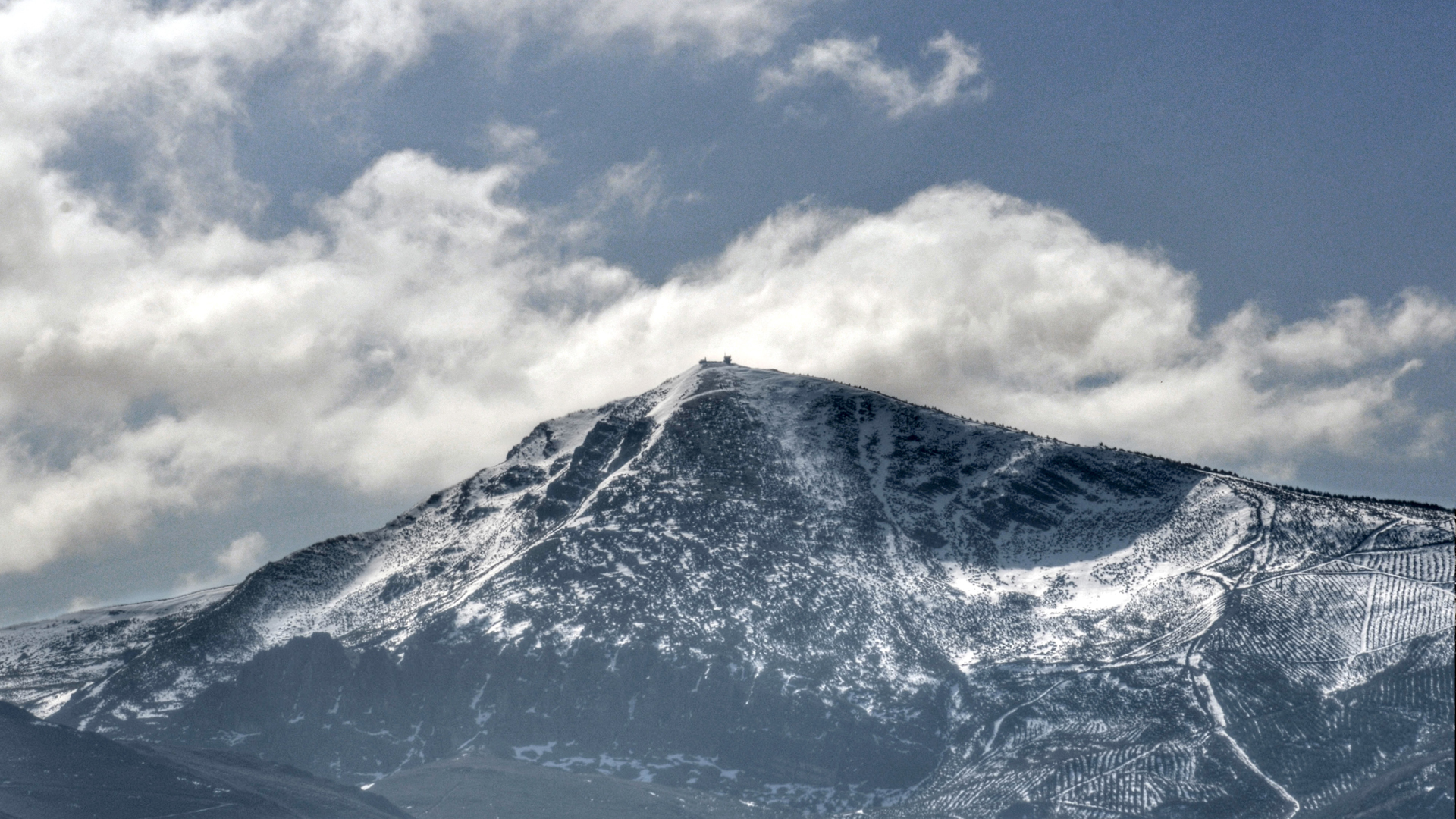 Vista de La Aquiana y los Doce Apóstoles desde Ponferrada.